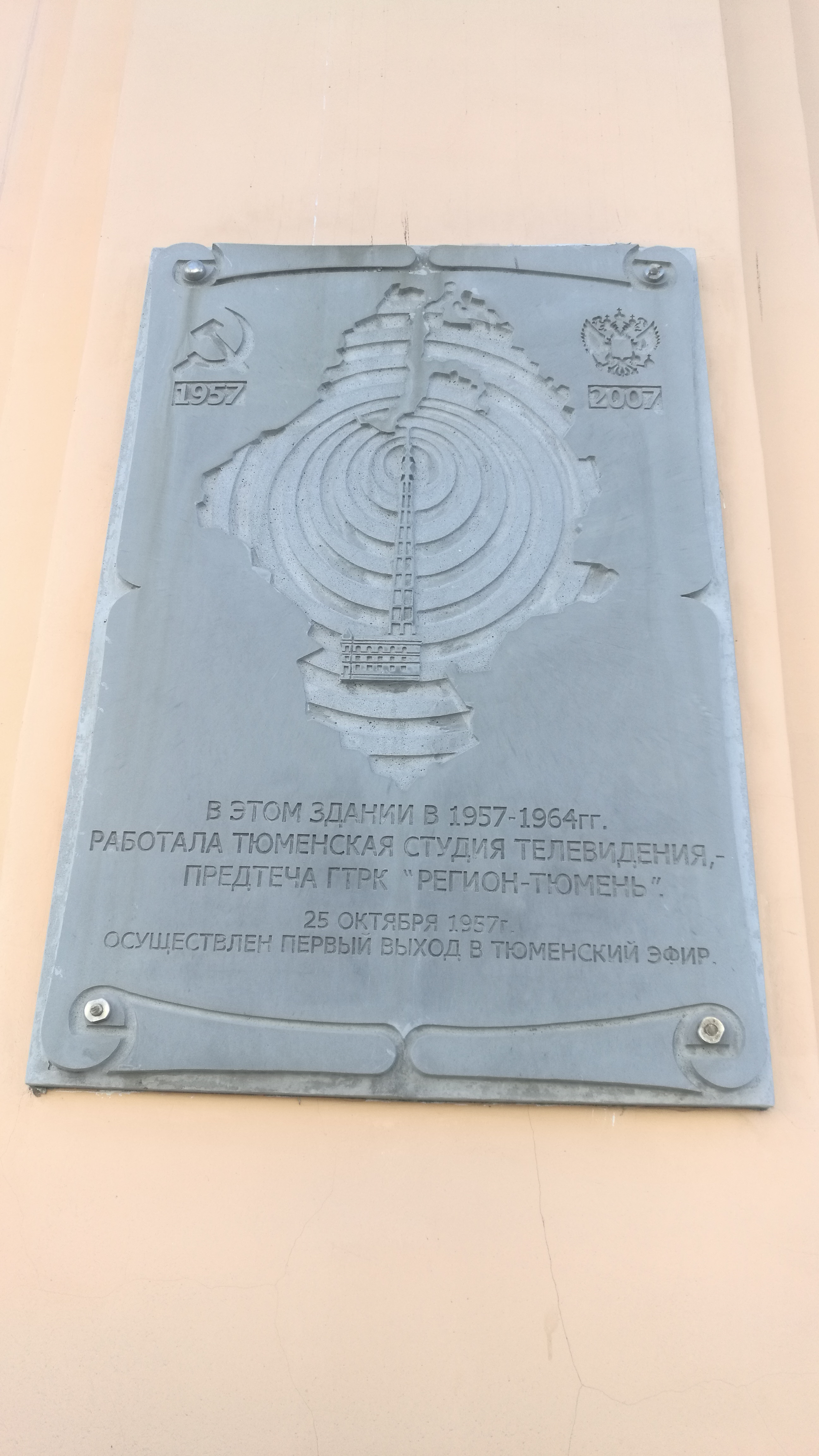 La Ĉefpoŝtejo. Tjumeno, Rusio.